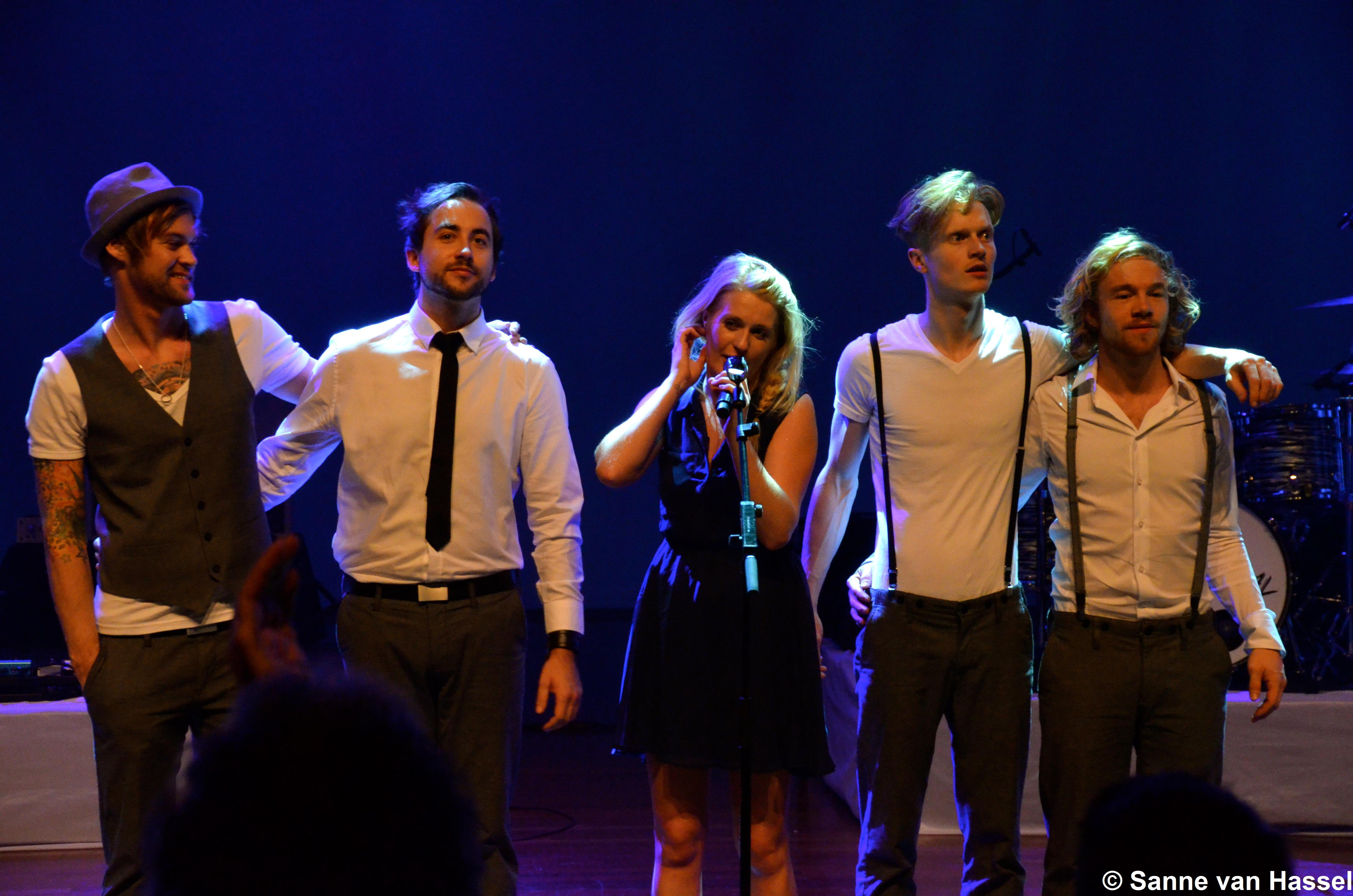 Miss Montreal tijdens een show van haar theatertour S..SS..SSS..Sanne in het Chassé Theater te Breda.